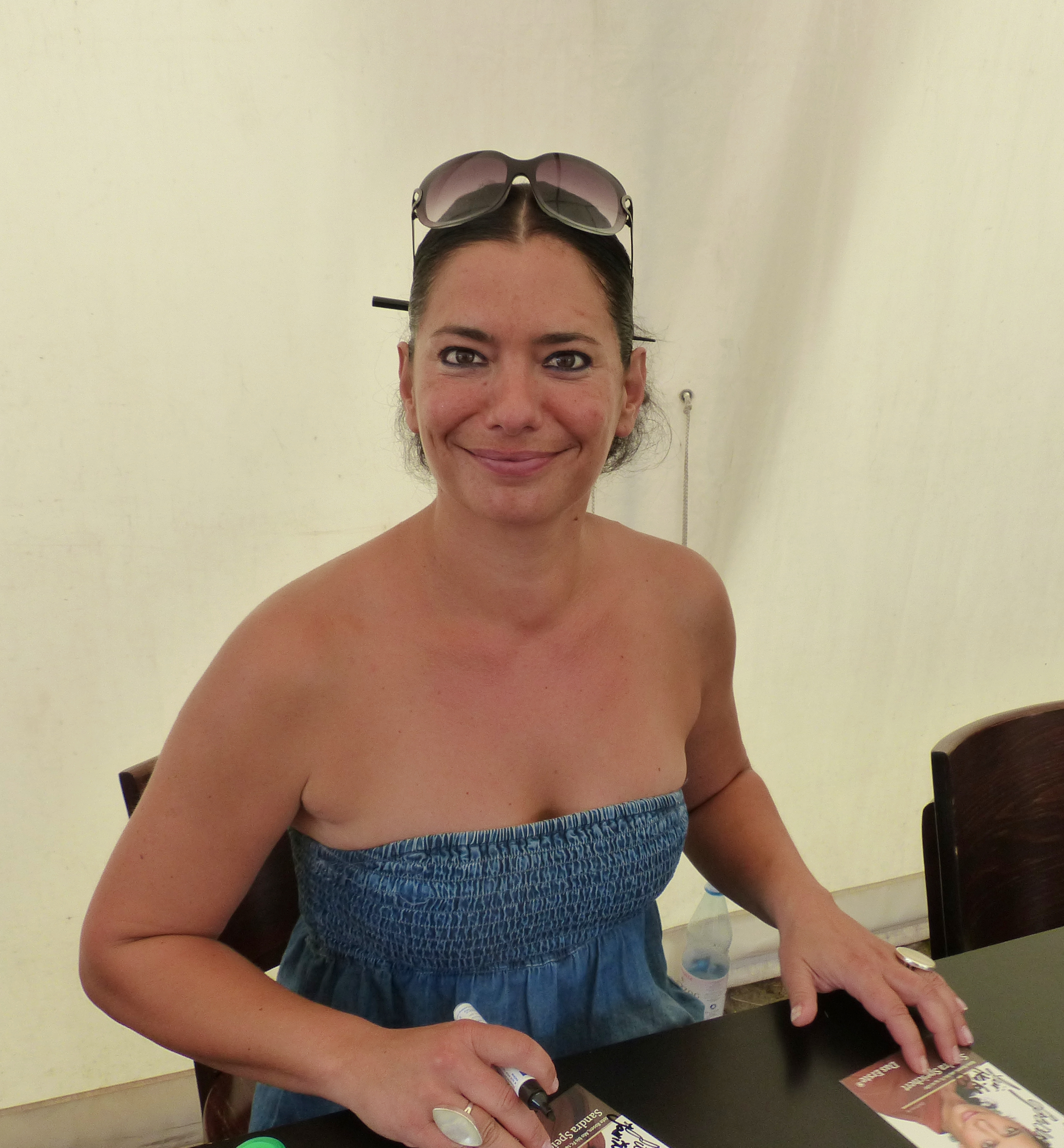 Sandra Speichert (Vera Christiansen) bei der Autogrammstunde beim Rote Rosen-Fantag 2013, 28.07.2013, Lüneburg